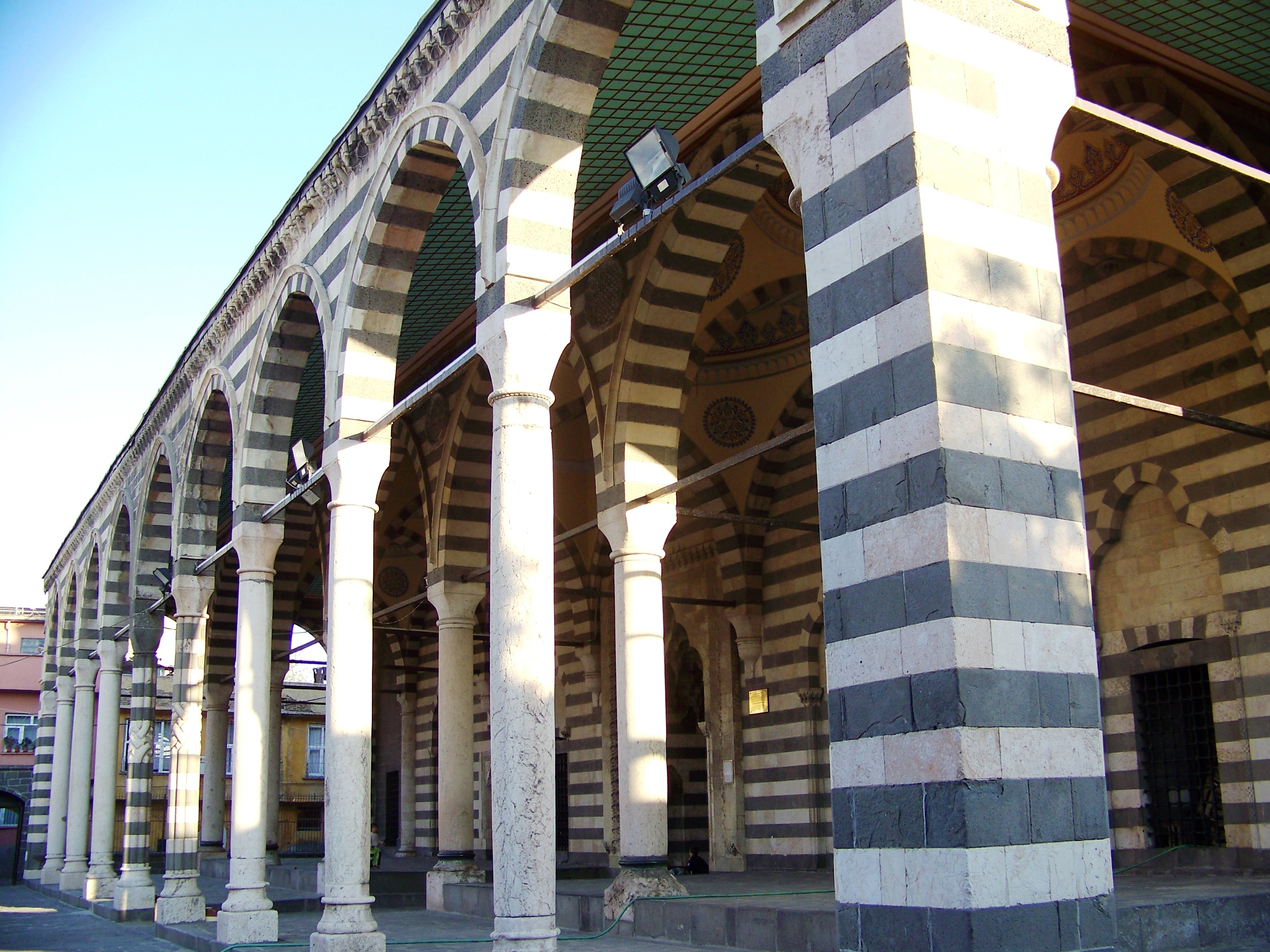 Diyarbakır Behram Paşa Camisi.